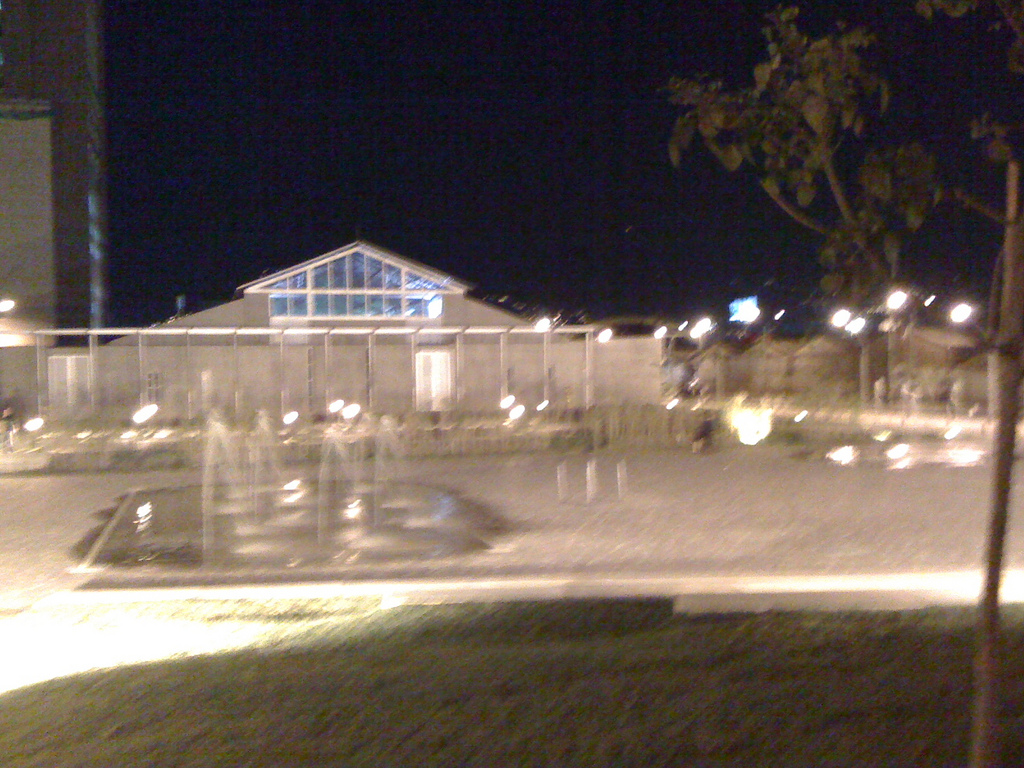 Nueva sede del MAMM